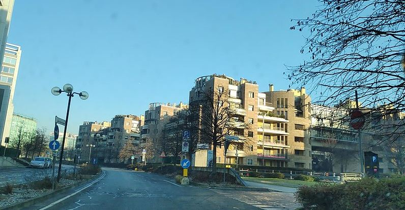 Torri lombarde di via Bruxelles di San Donato Milanese del progetto di Kenzo Tange (Gennaio 2020)